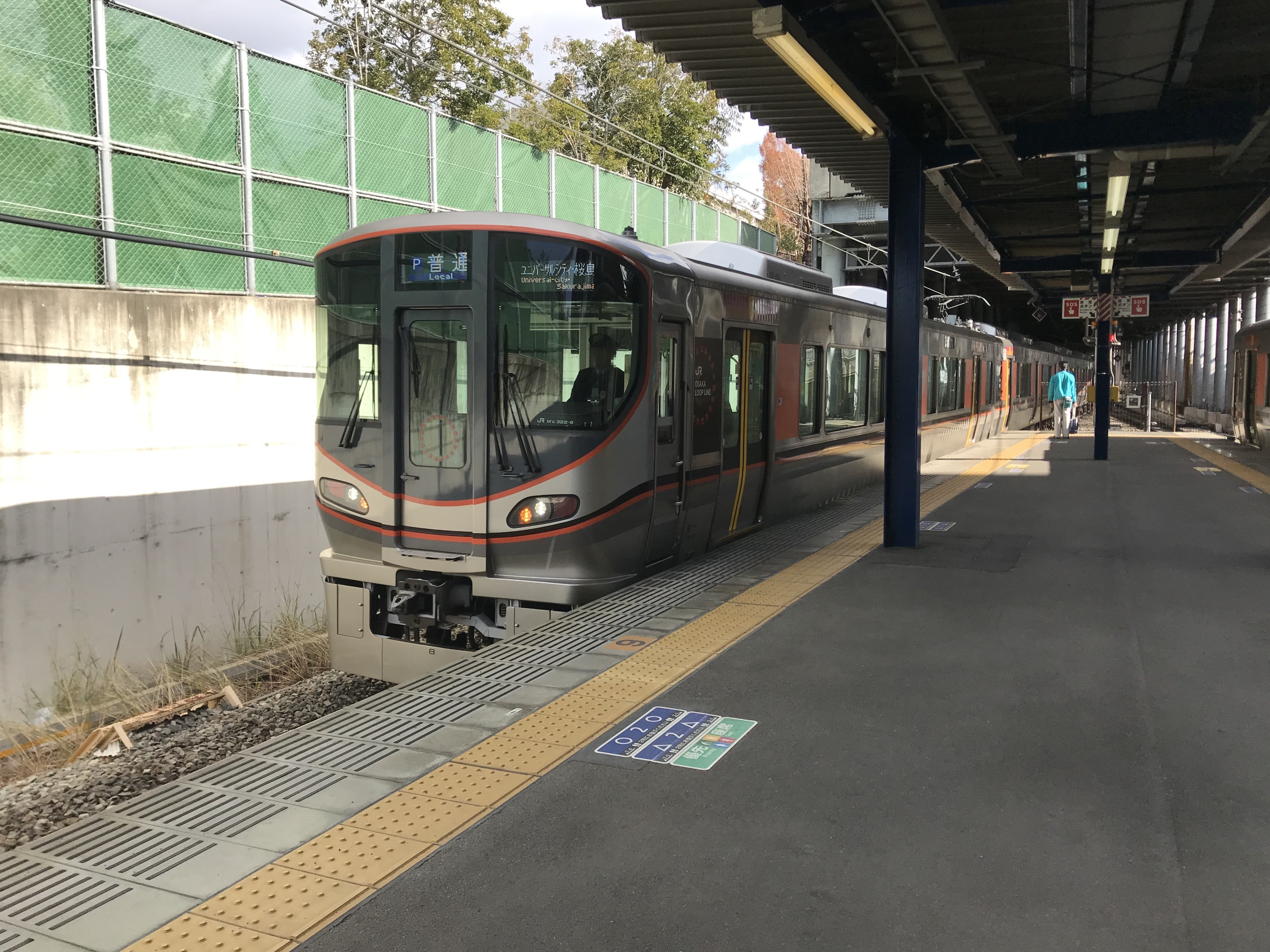 桜島駅に到着する桜島線列車